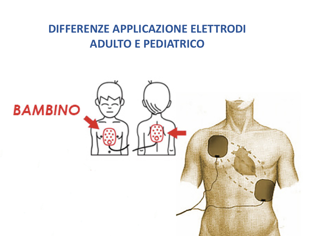 Immagine che riporta visivamente le differenze tra il posizionamento delle piastre di un defibrillatore su un paziente Pediatrico ( da 1 a 8 anni ) ed un paziente adulto (da 8 anni in su) secondo le linee Guida Internazionali vigenti.